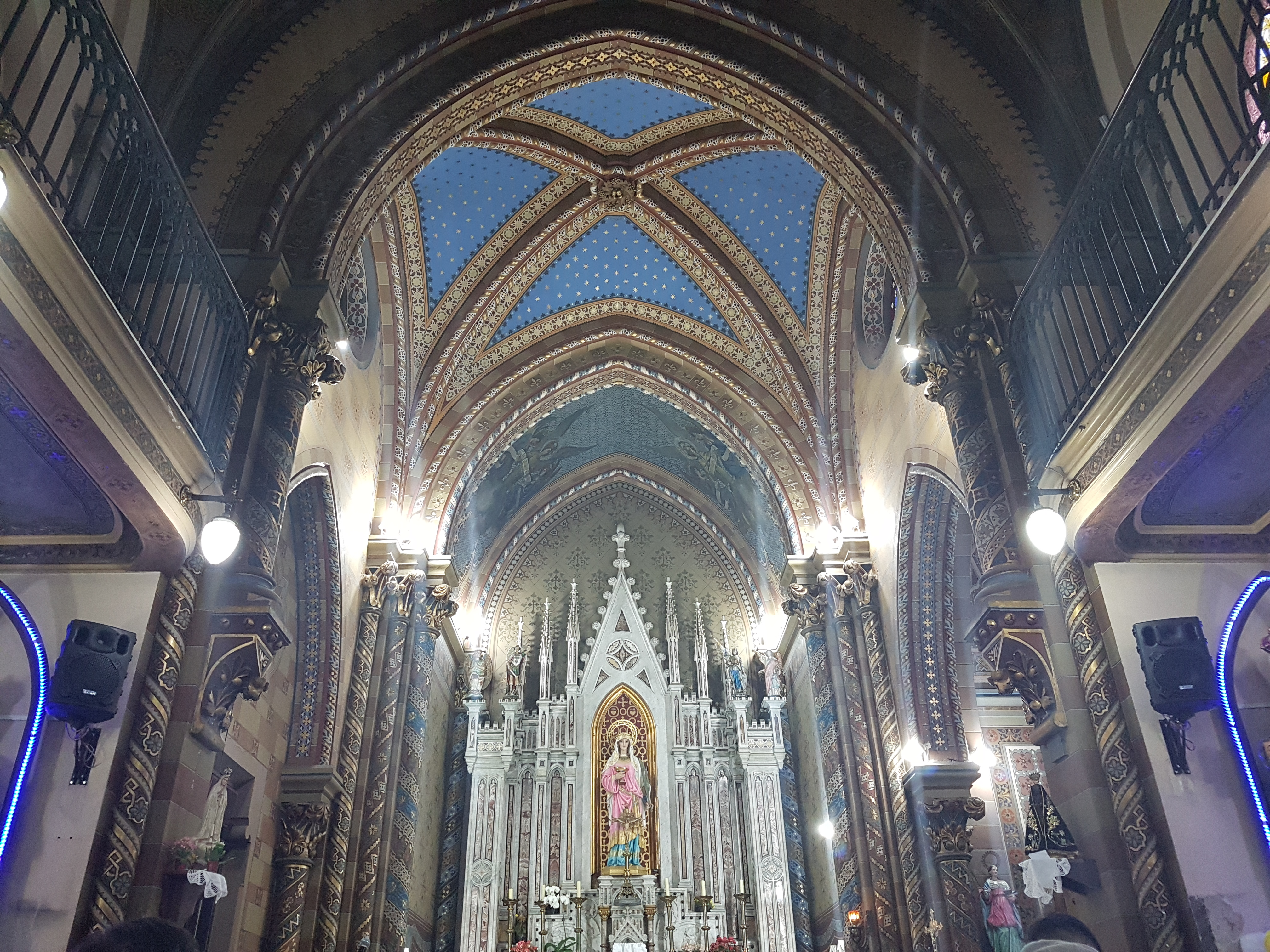 Capela do Menino Jesus e Santa Luzia, situada na Rua Tabatringuera, 104, região da Sé.